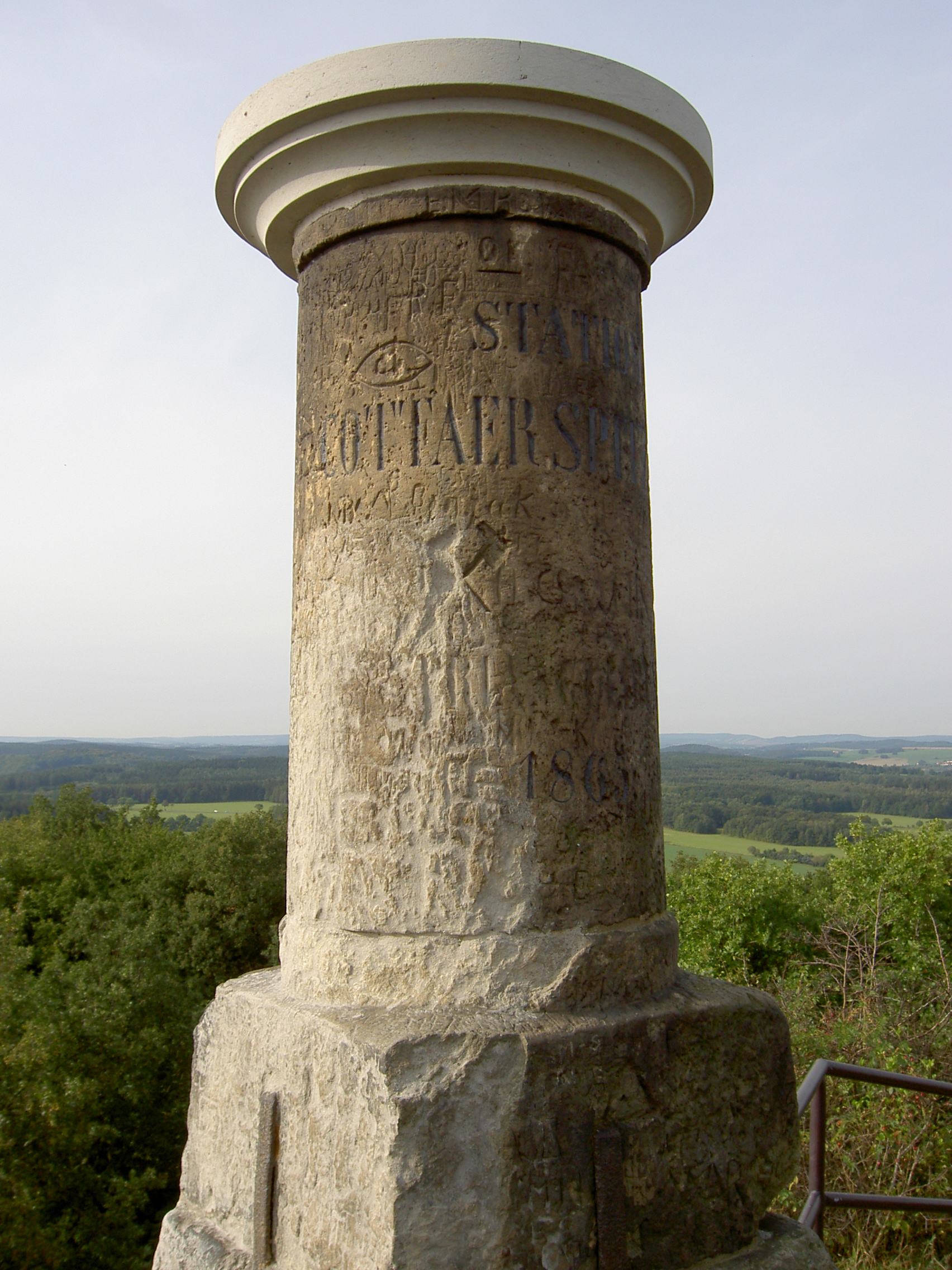 Triangulierungssäule Nr. 57 von 1865 mit neuer Sandsteinplatte als Abdeckung